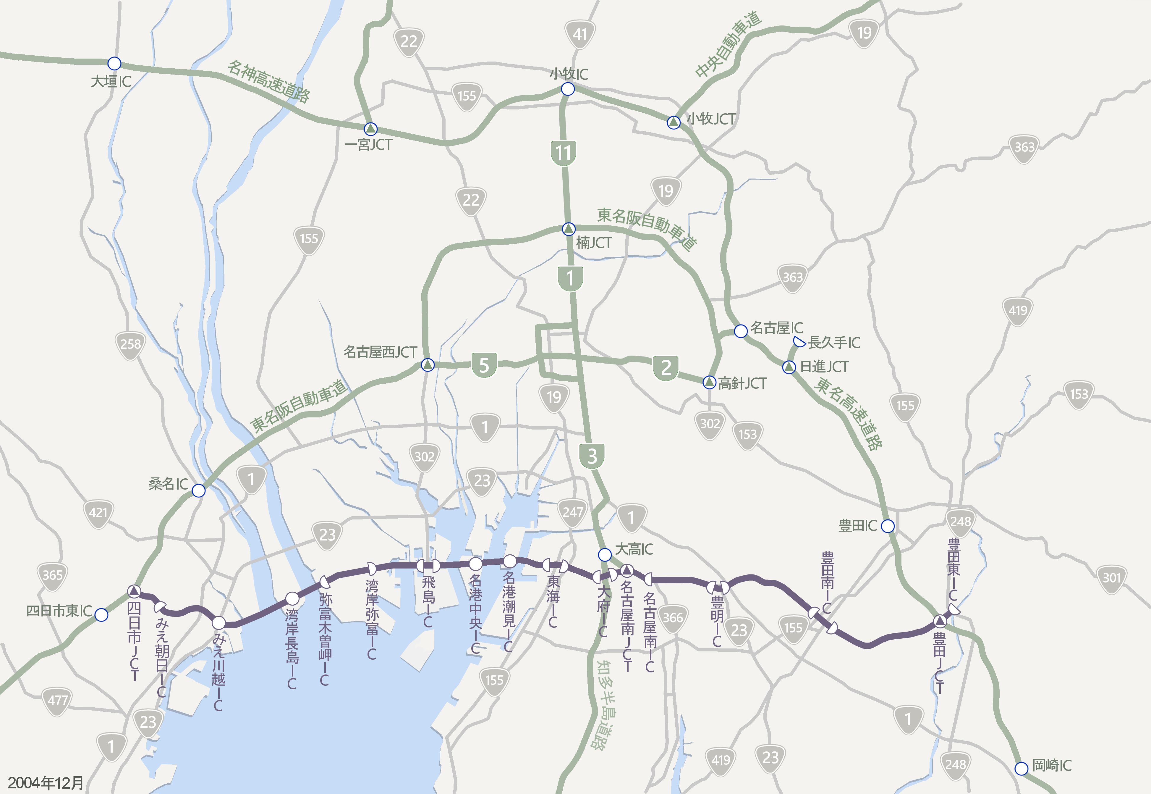 伊勢湾岸自動車道2004年12月時点